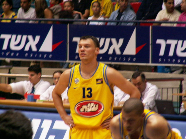 שארונאס (שאראס) יאסיקביציוס צולם על-ידי אבי קדמי This picture was taken by Avi Kedmi